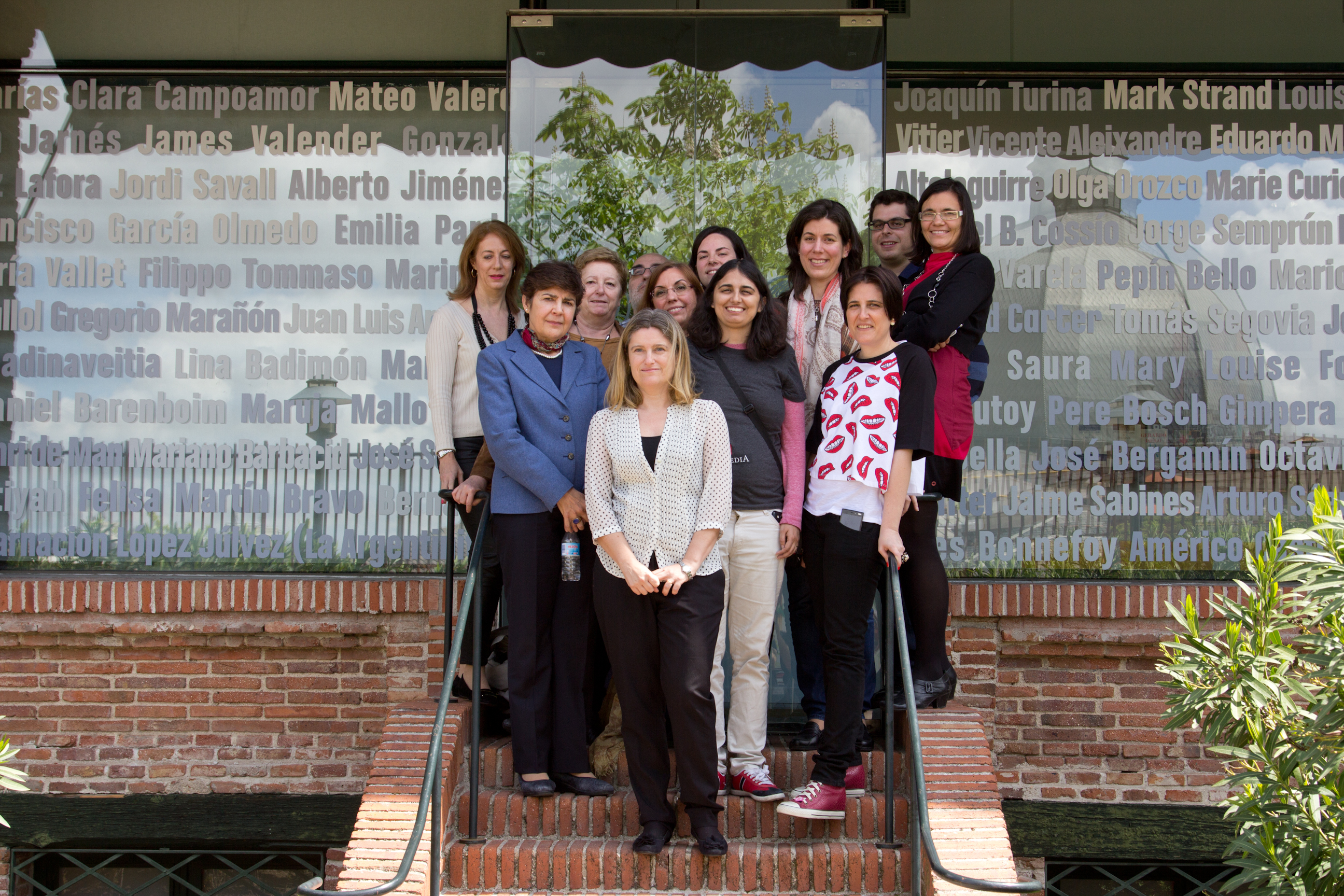 Editatón por la visibilidad de las científicas en Wikipedia 2015, Residencia de Estudiantes, Madrid, España.